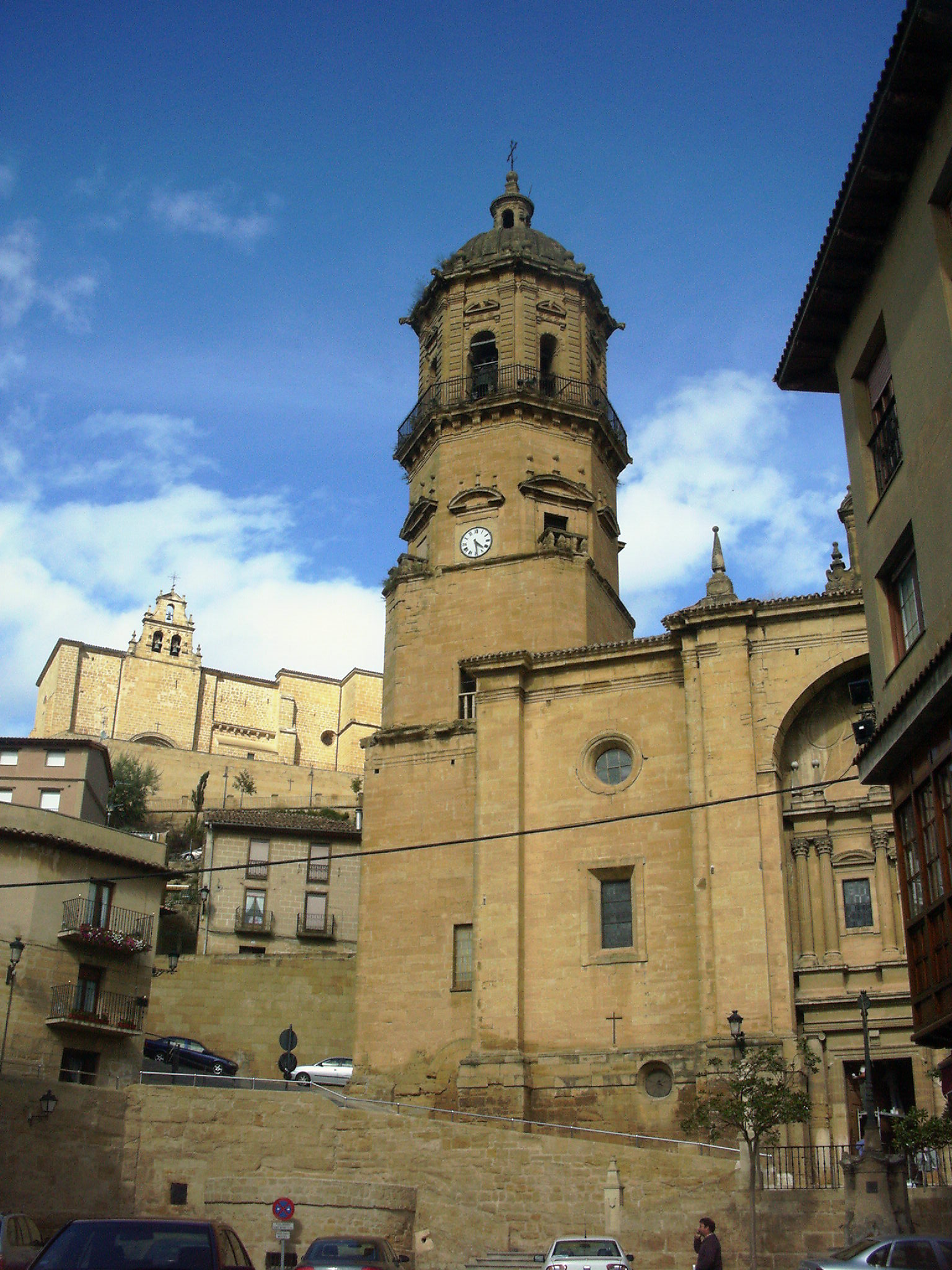 Bastidako Andra Mari eliza eta Kristo Santuaren gotorleku-tenplua